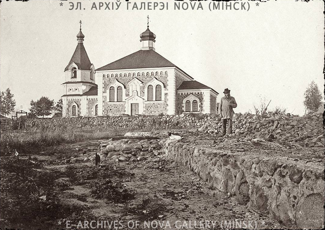 Беларуская (тарашкевіца): Сабакінцы (Sabakincy). Пакроўская царква-мураўёўка